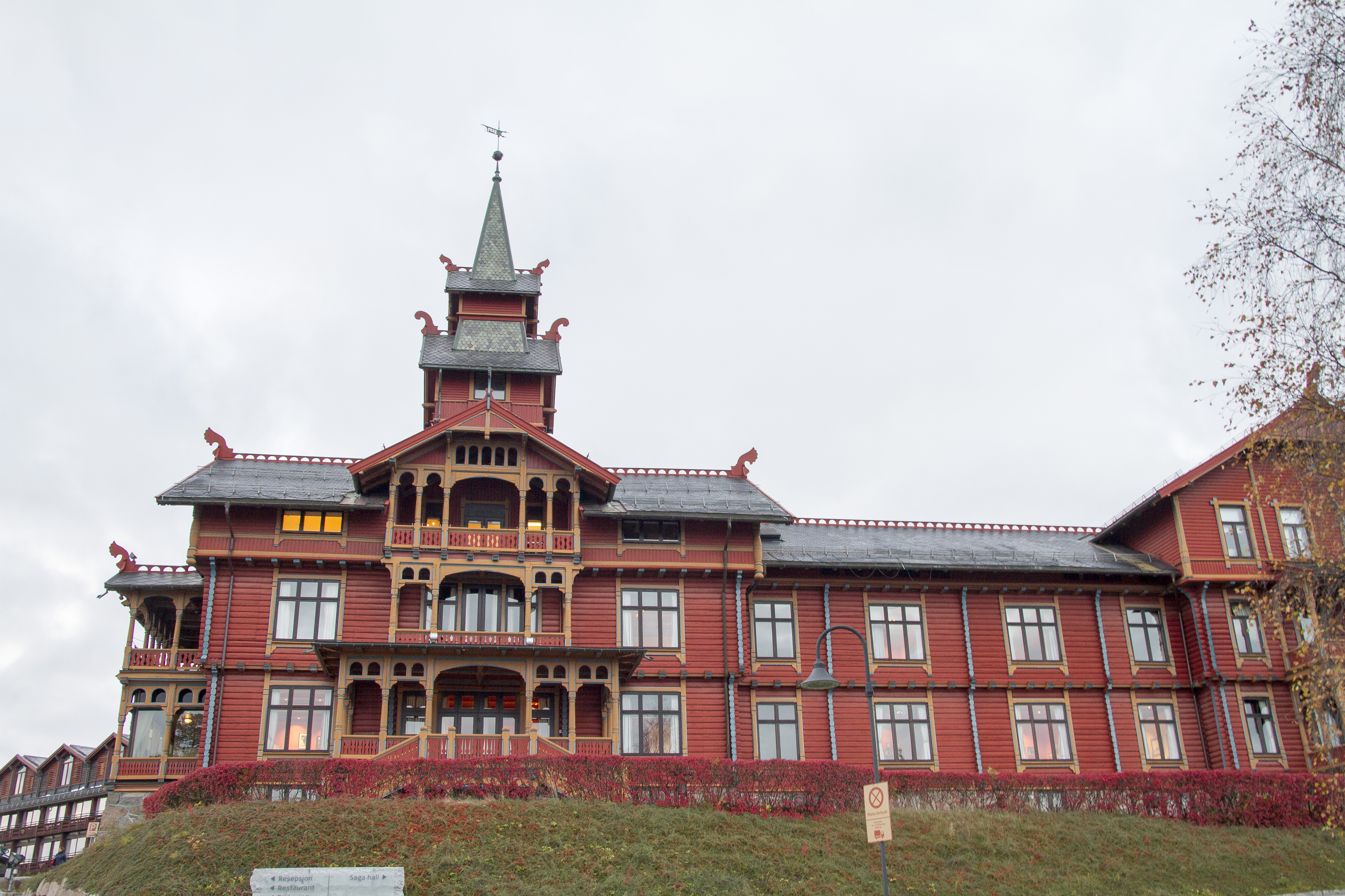 Norges Energidager 2015